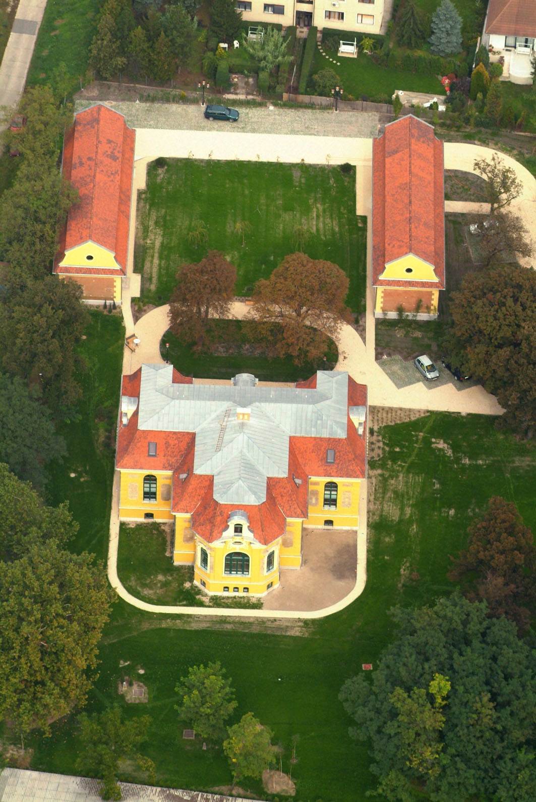 Palace - Halásztelek - Hungary - Europe